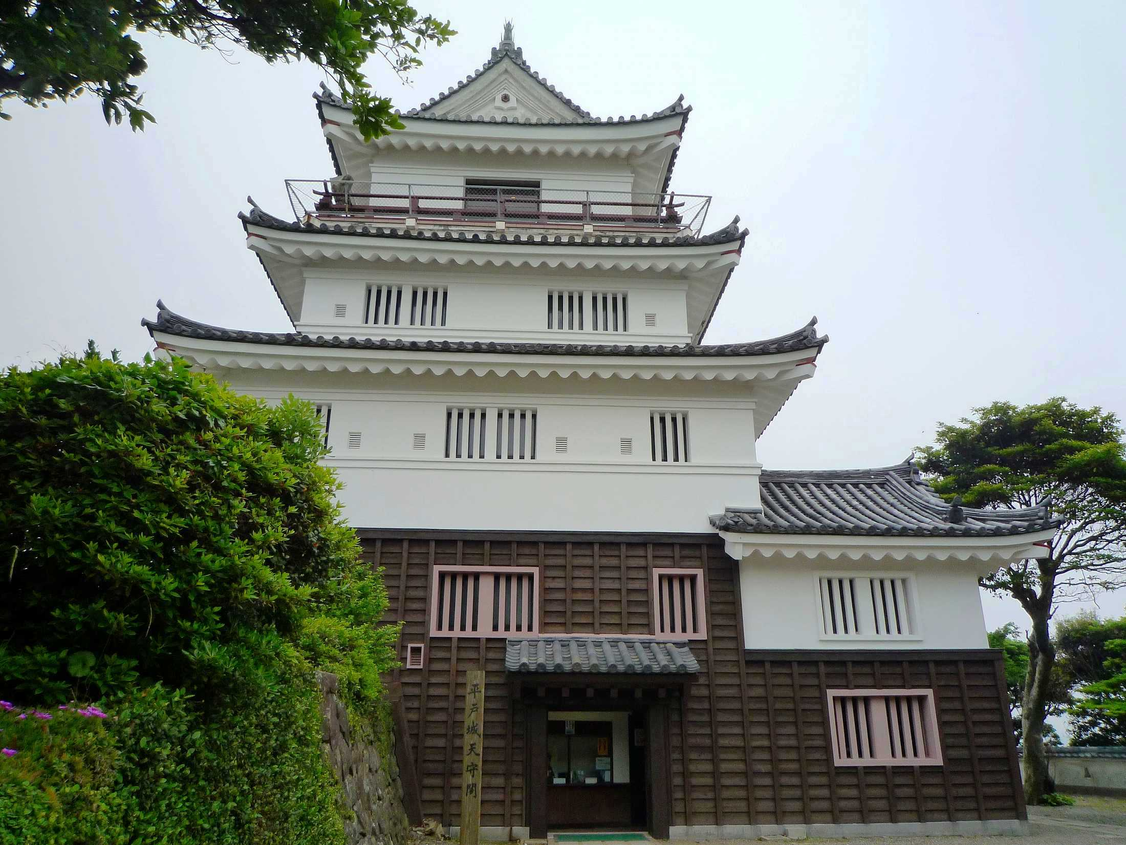 平戸城天守閣